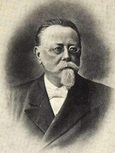 Adolf Kubeš (1845 - 1907), Středoškolský profesor, biolog a historik.